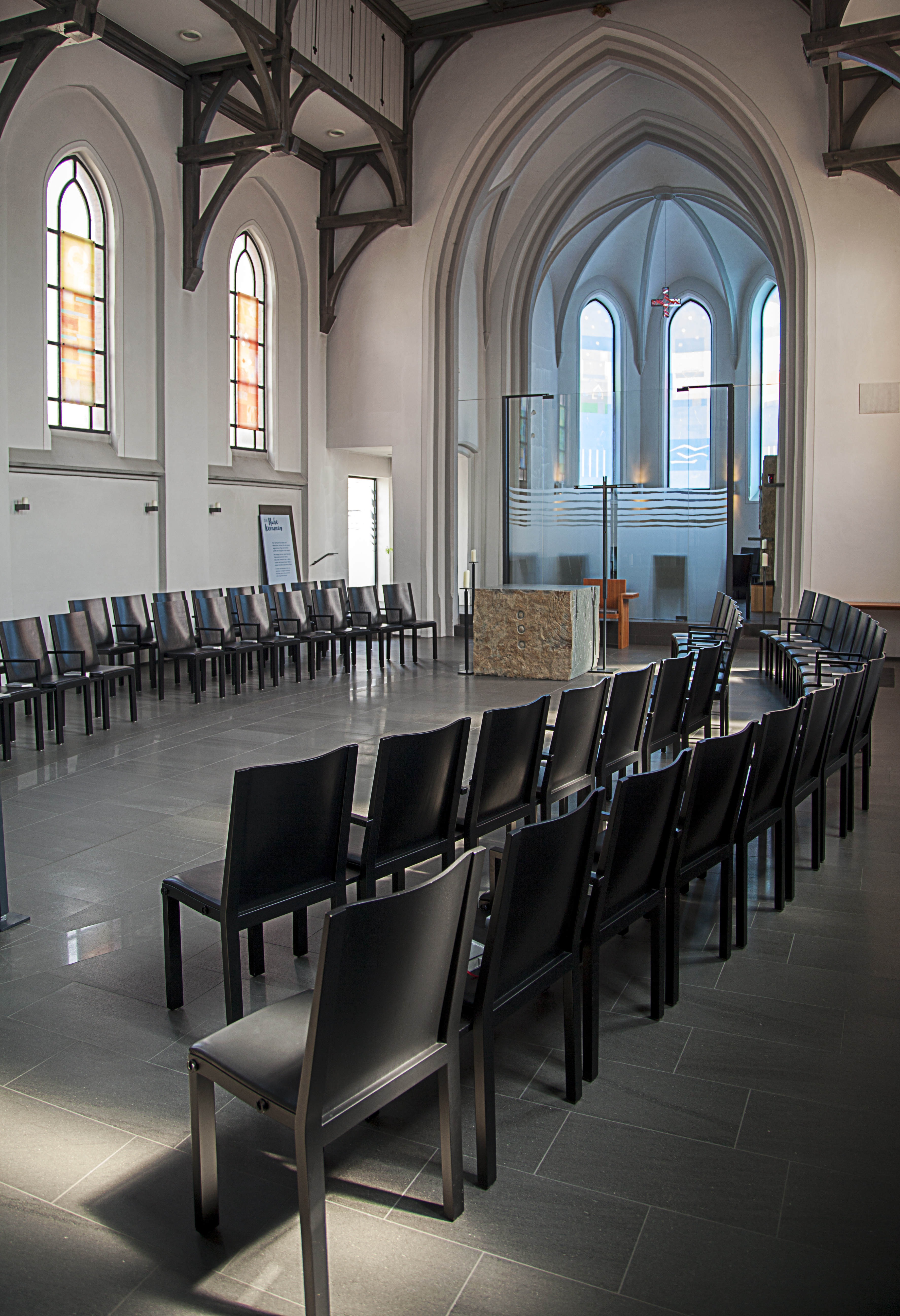 Norderney - St. Ludgerus - Innenansicht.jpg